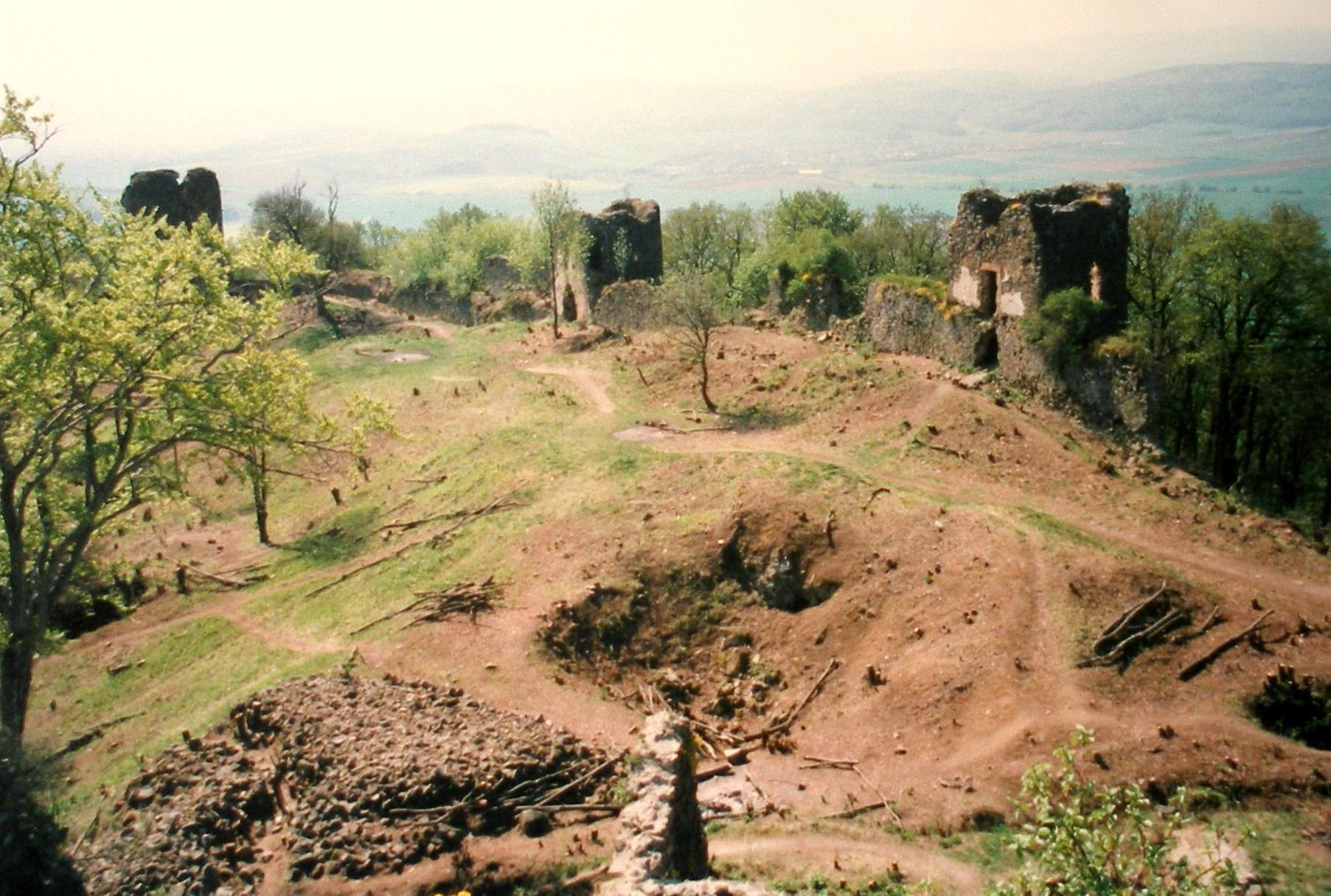 Šarišský hrad región Šariš, kraj Prešov